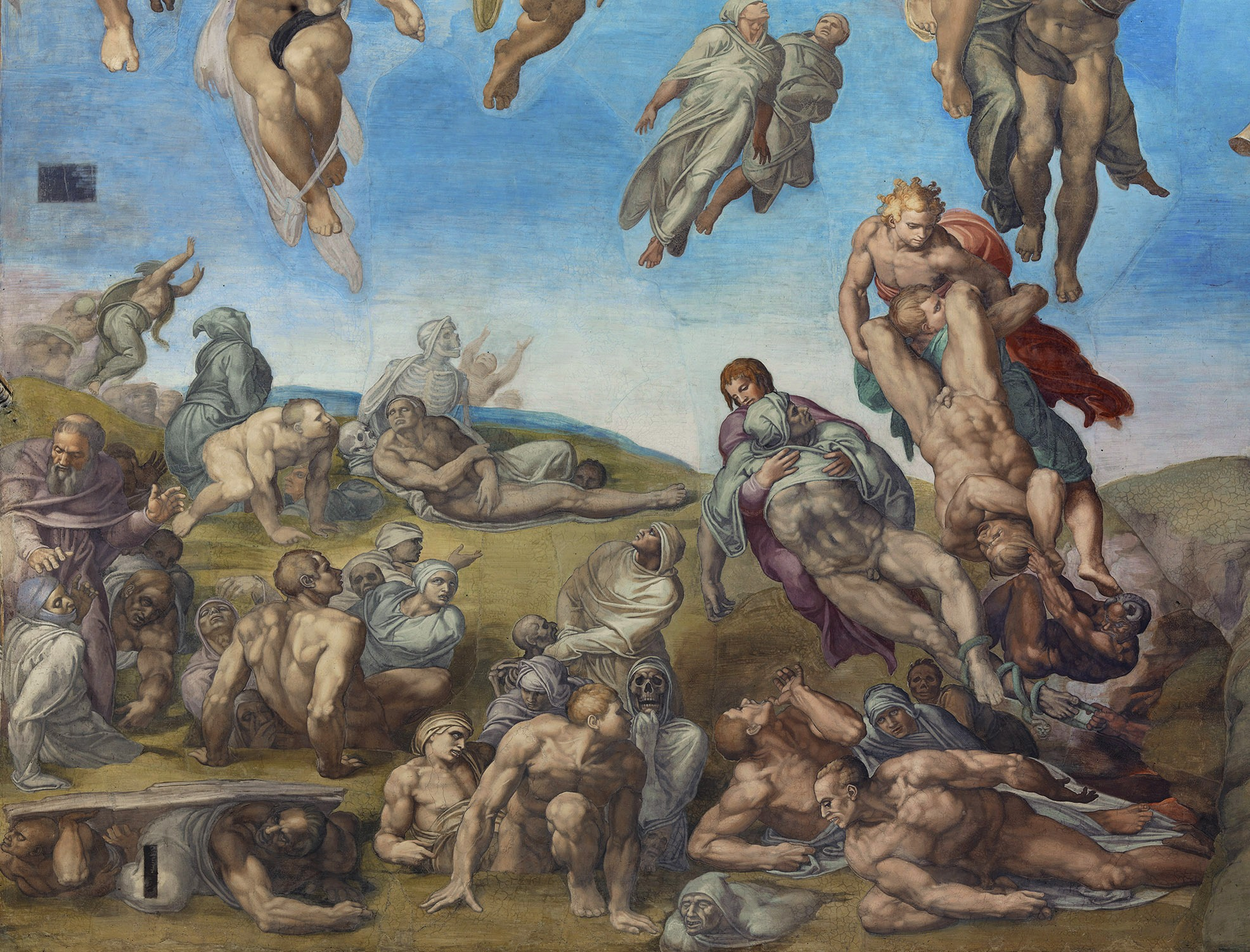 MICHELANGELO Buonarroti Last Judgment Fresco, 1370 x 1220 cm Cappella Sistina, Vatican